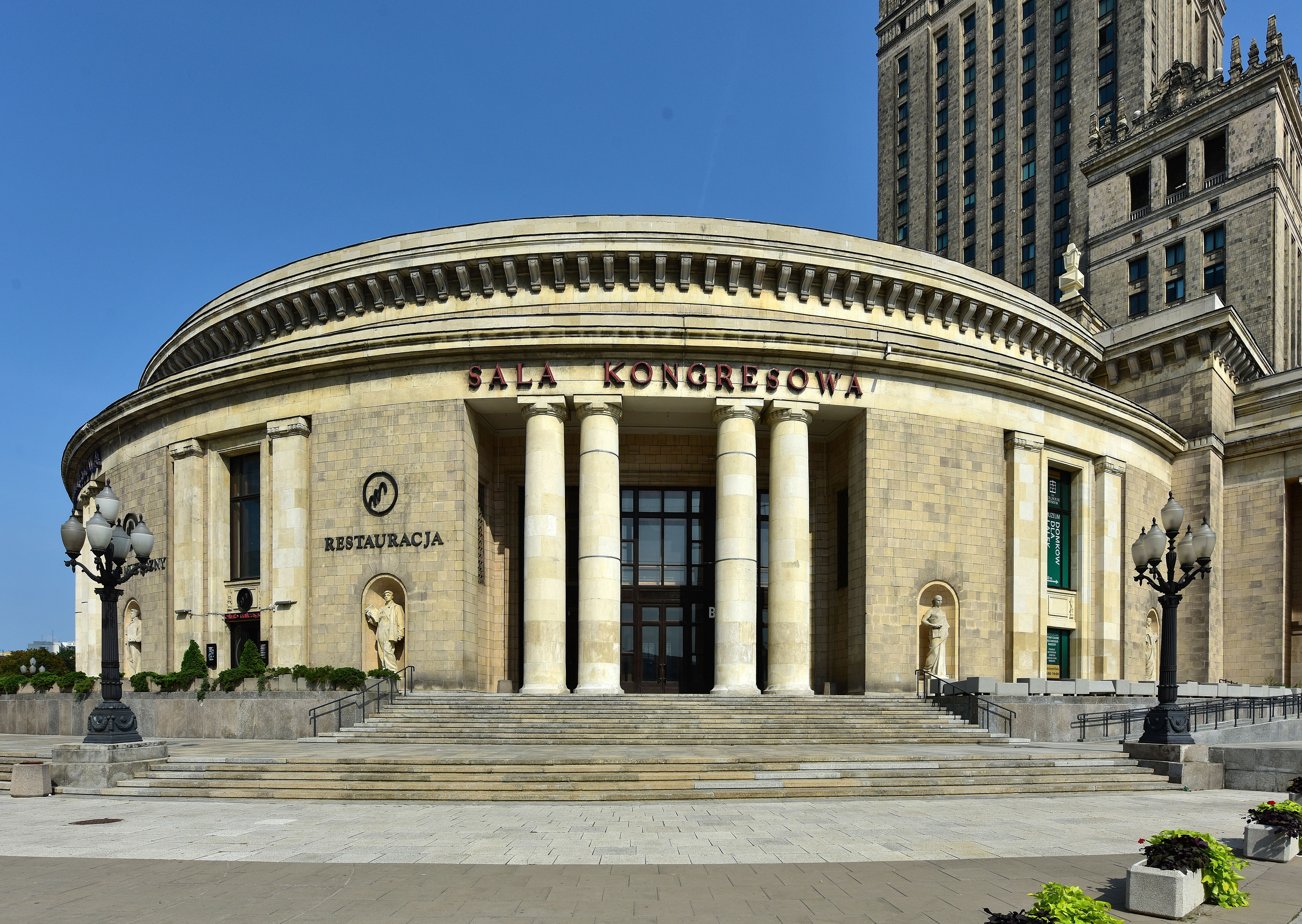 Sala Kongresowa PKiN od strony południowej